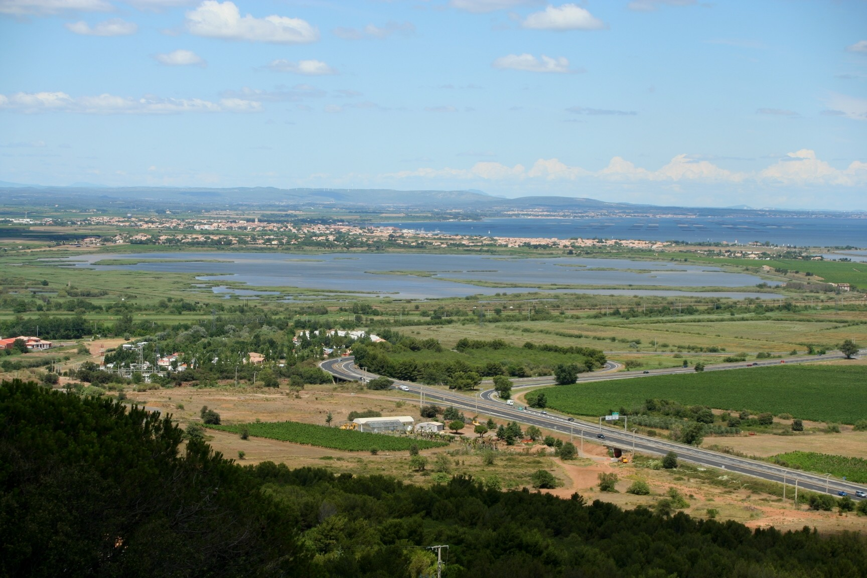 L'étang du Bagnas à Agde (Hérault, France) vu du mont Saint-Loup. En arrière plan, Marseillan et l'étang de Thau.